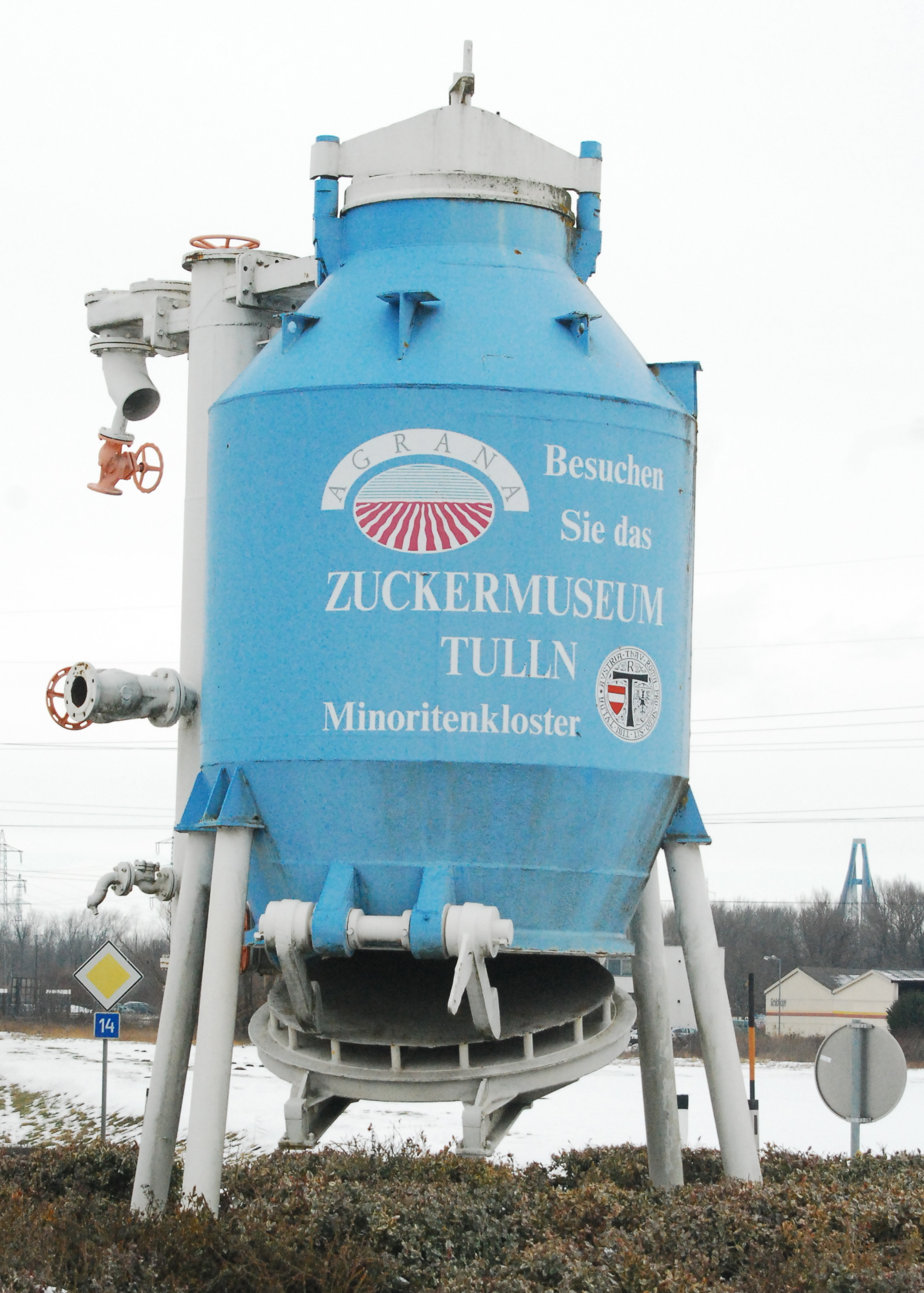 Tullner Kreisverkehr "Zuckermuseum"